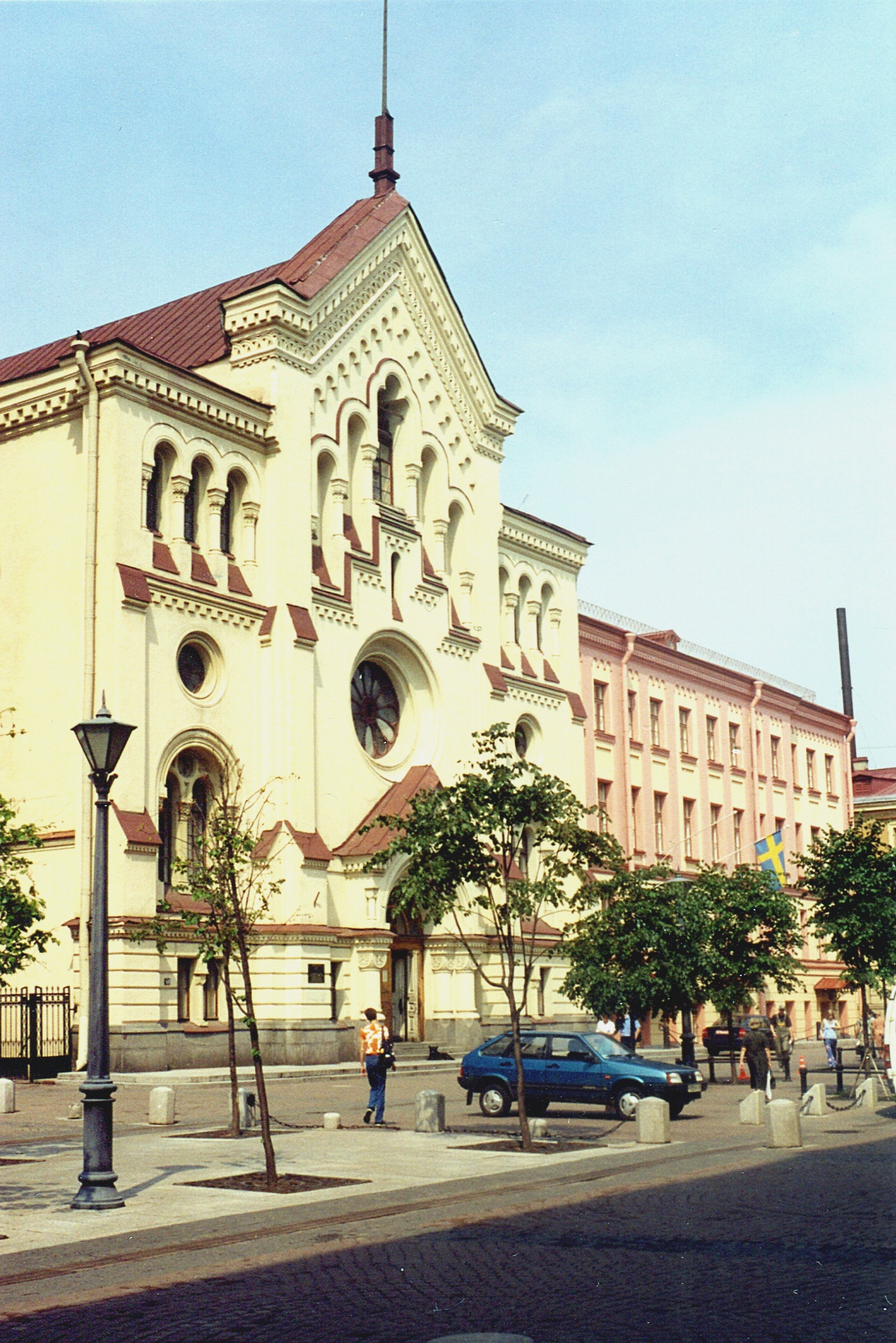 Шведская церковь